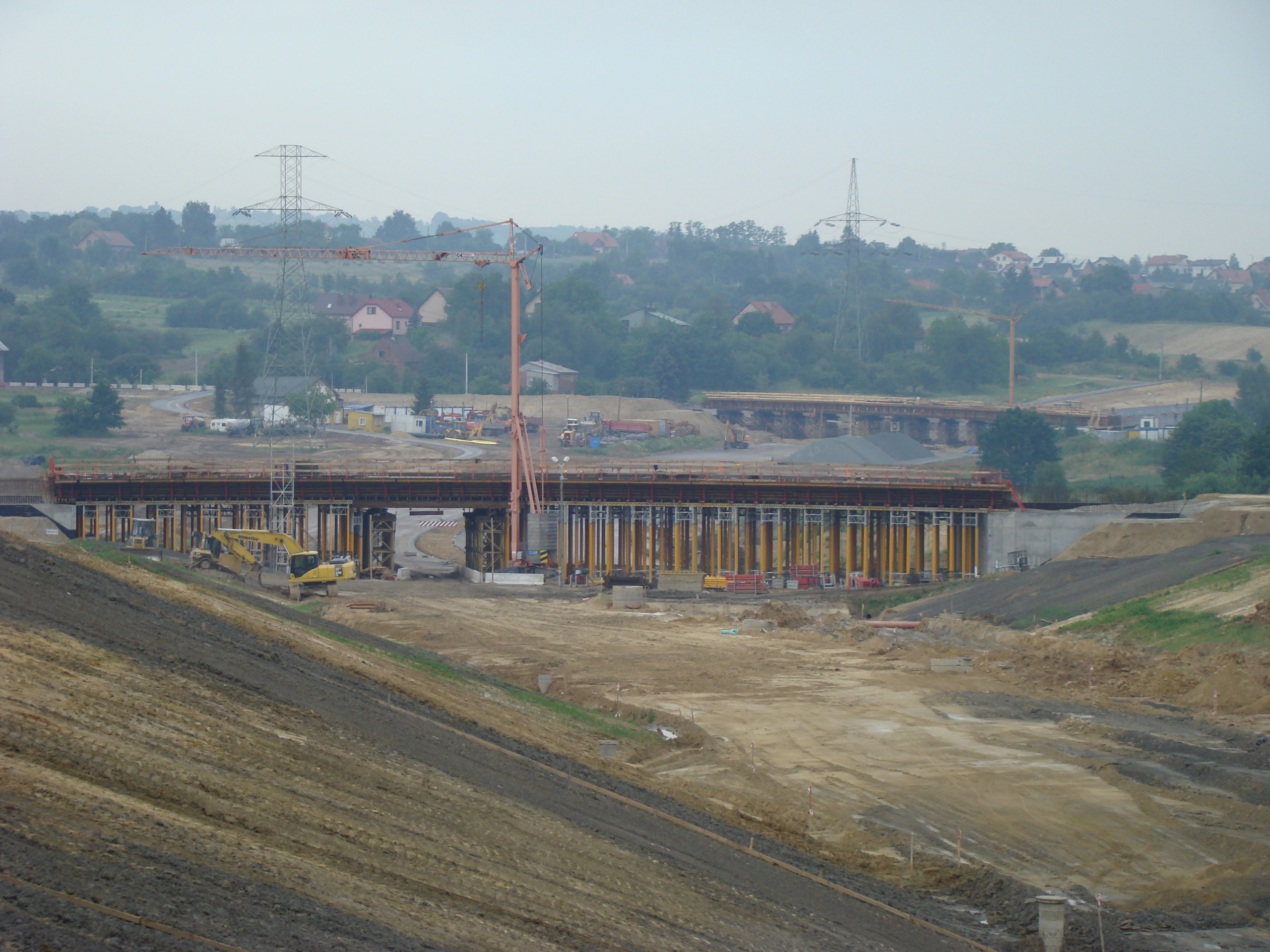 Budowa autostrady A4 na odcinku Kraków - Szarów